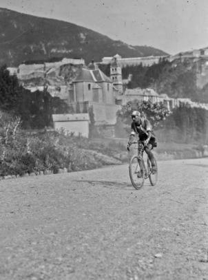 Henri Pélissier dans le Tour de France 1923, à Briançon.